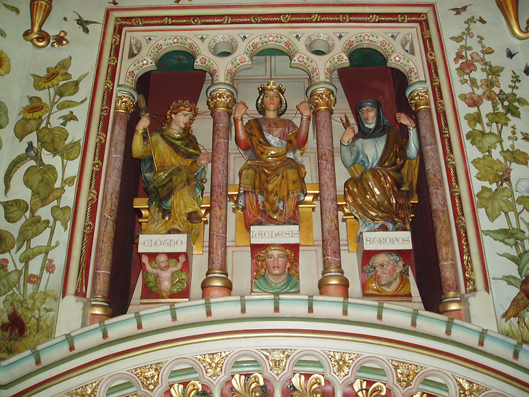 Decoración interior de Castell Coch, Cardiff, Gales.